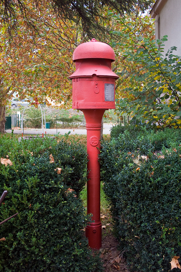 L'ancienne cloche électrique d'annonce des trains de la gare de Die (France - Drôme)